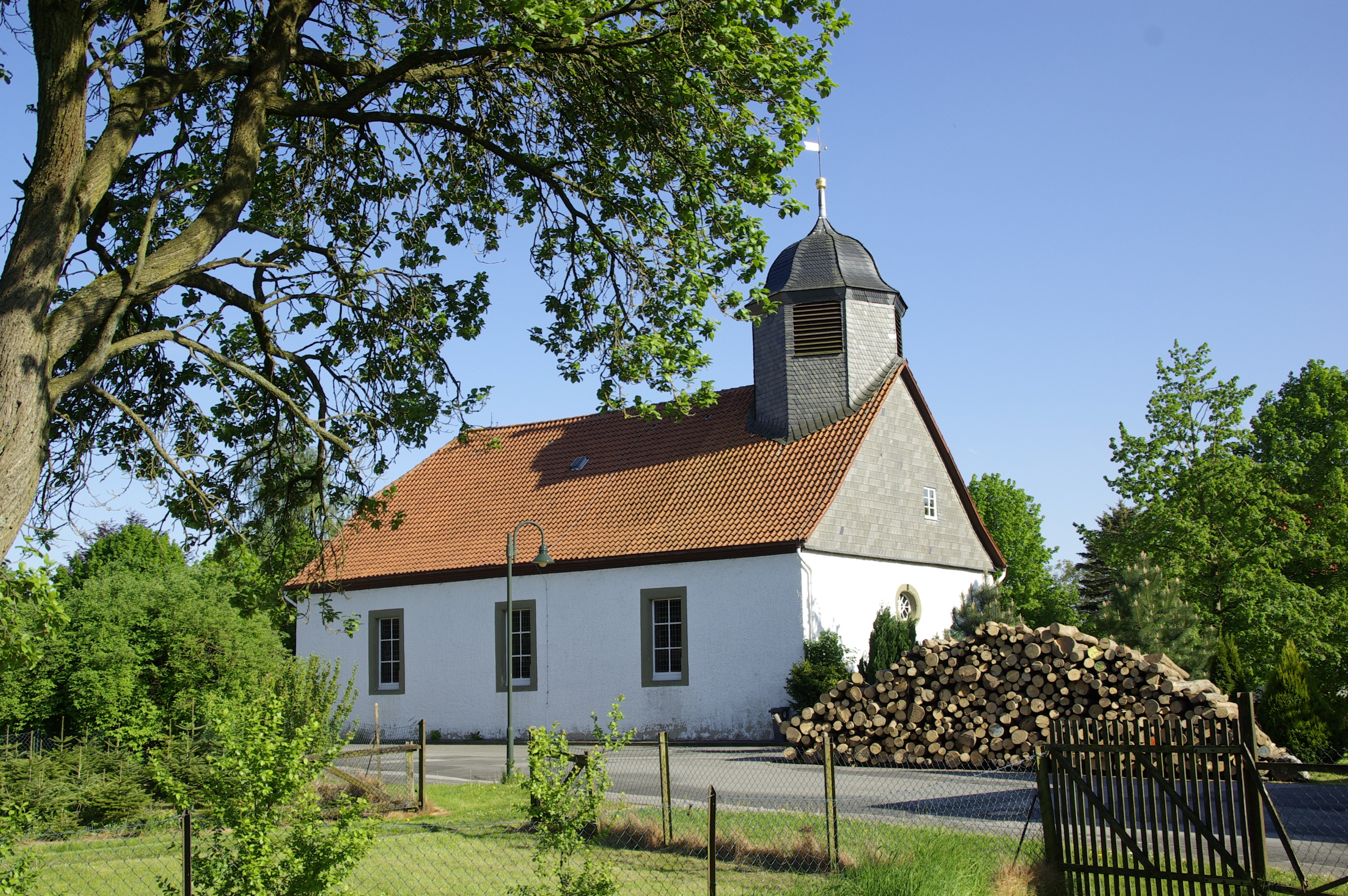 Evangelisch Lutherisch Kirche St. Antonius Münchehof Harz